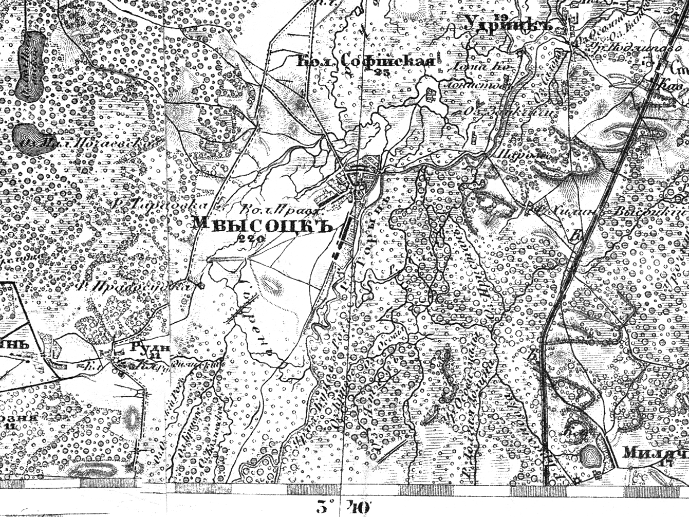 Военно-топографическая карта Российской Империи. М 1:126000. Волынская губерния. Ровенский уезд. Высоцк и окрестности. Исправлено по рекогносцировкам 1867 и 1876 годов. Железная дорога нанесена по съёмке 1887 года. Отпечатано в июле 1911 года